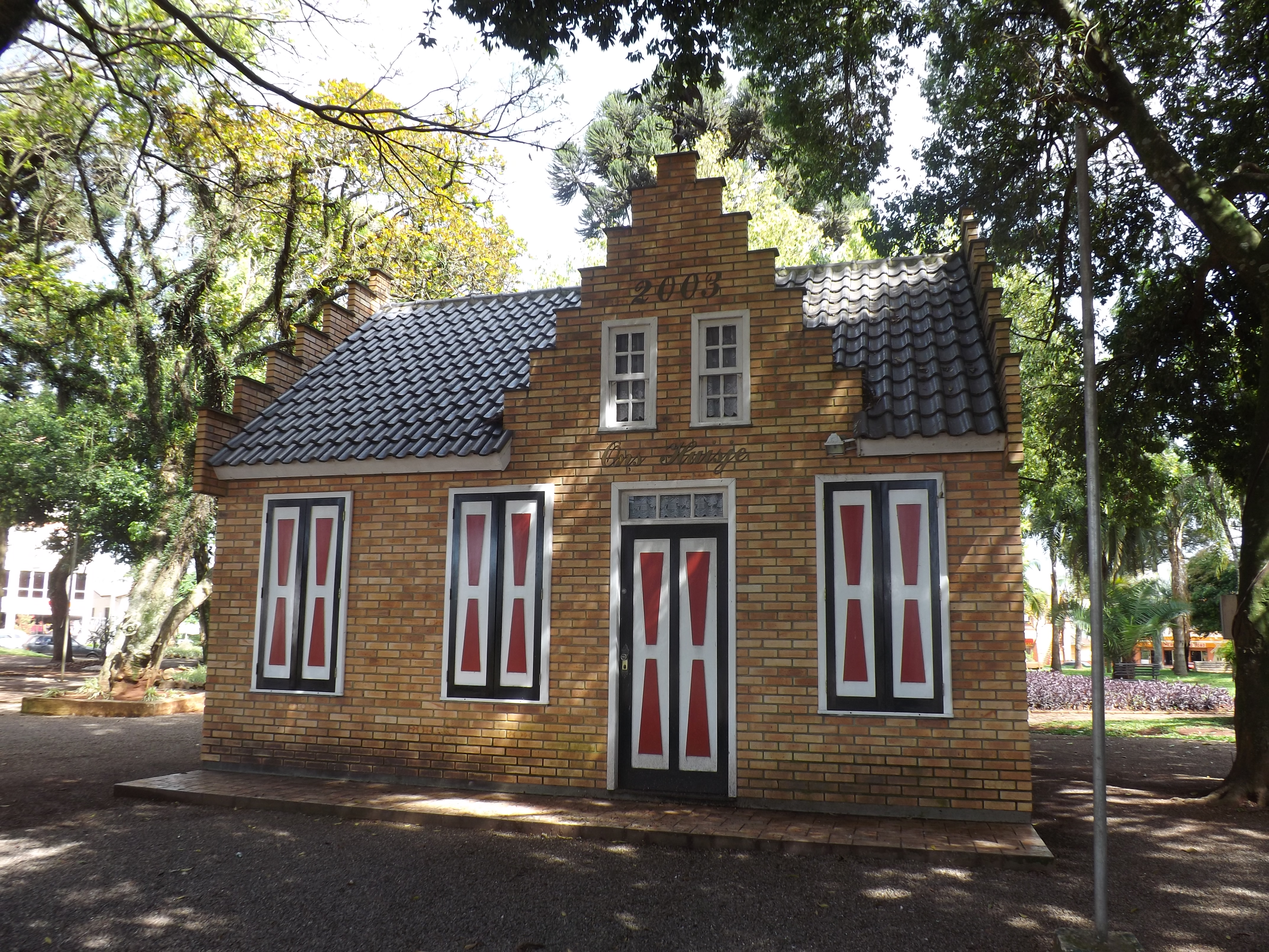 Praça Central Não Me Toque - Casa dos Imigrantes